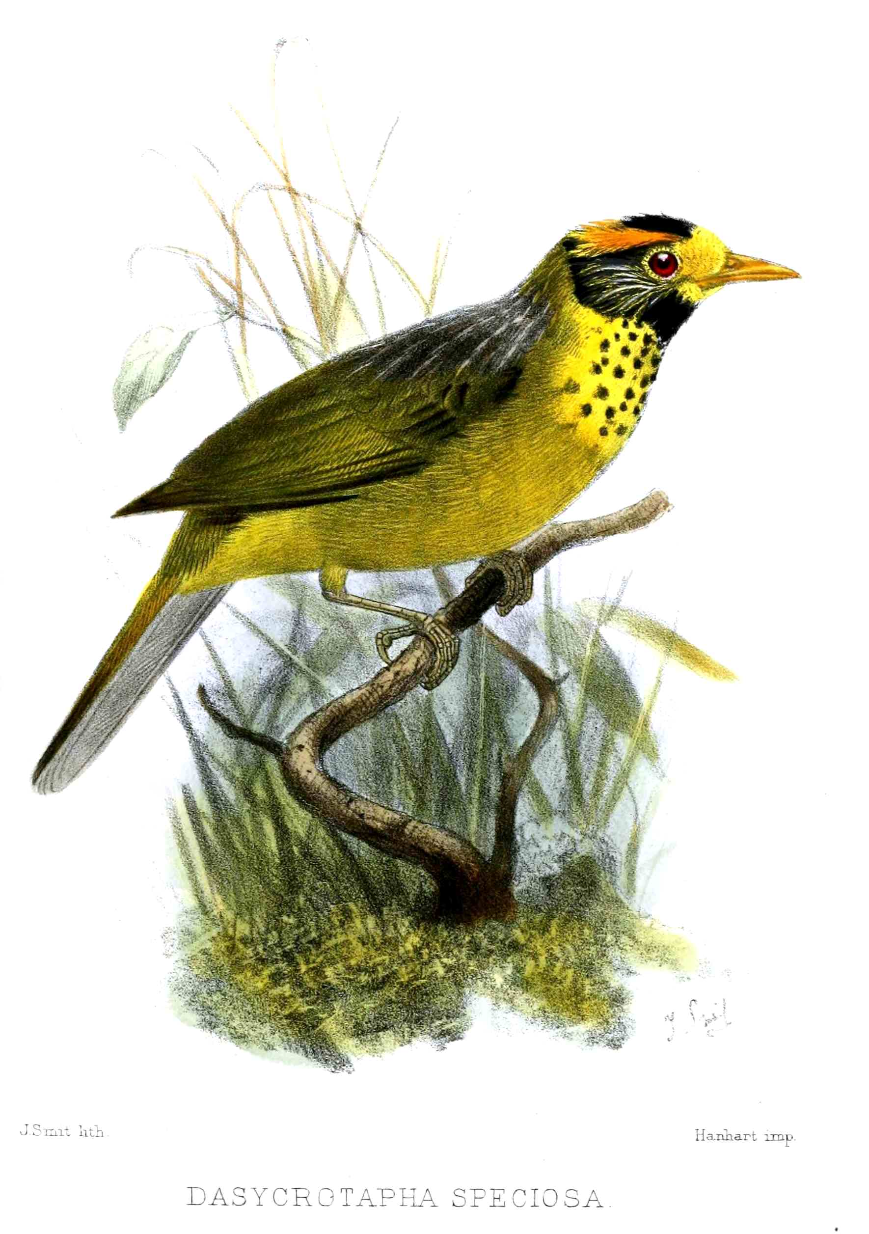 Dasycrotapha speciosa